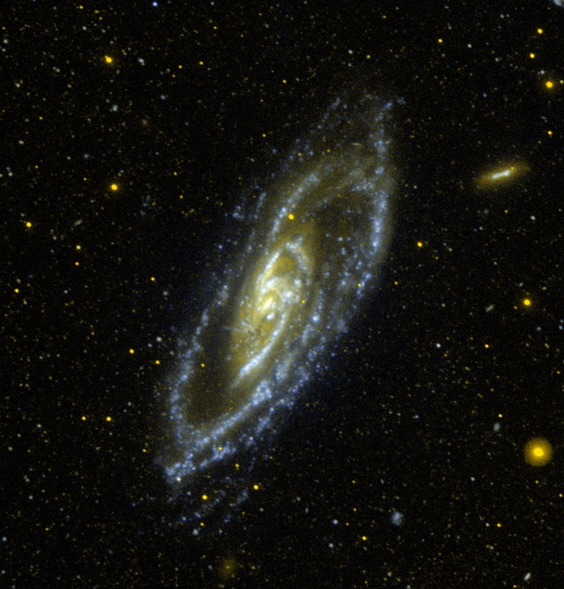 Messier 106, NGC 4258